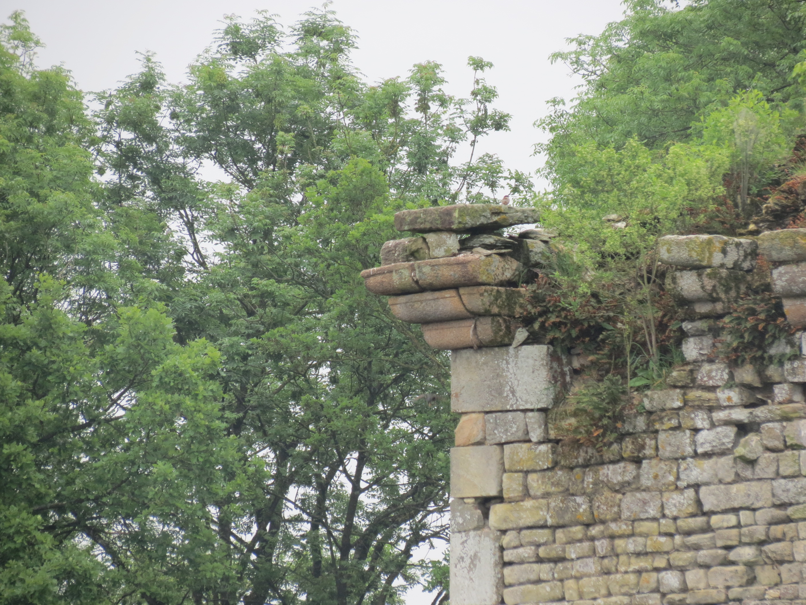 Montjean (53) - Château